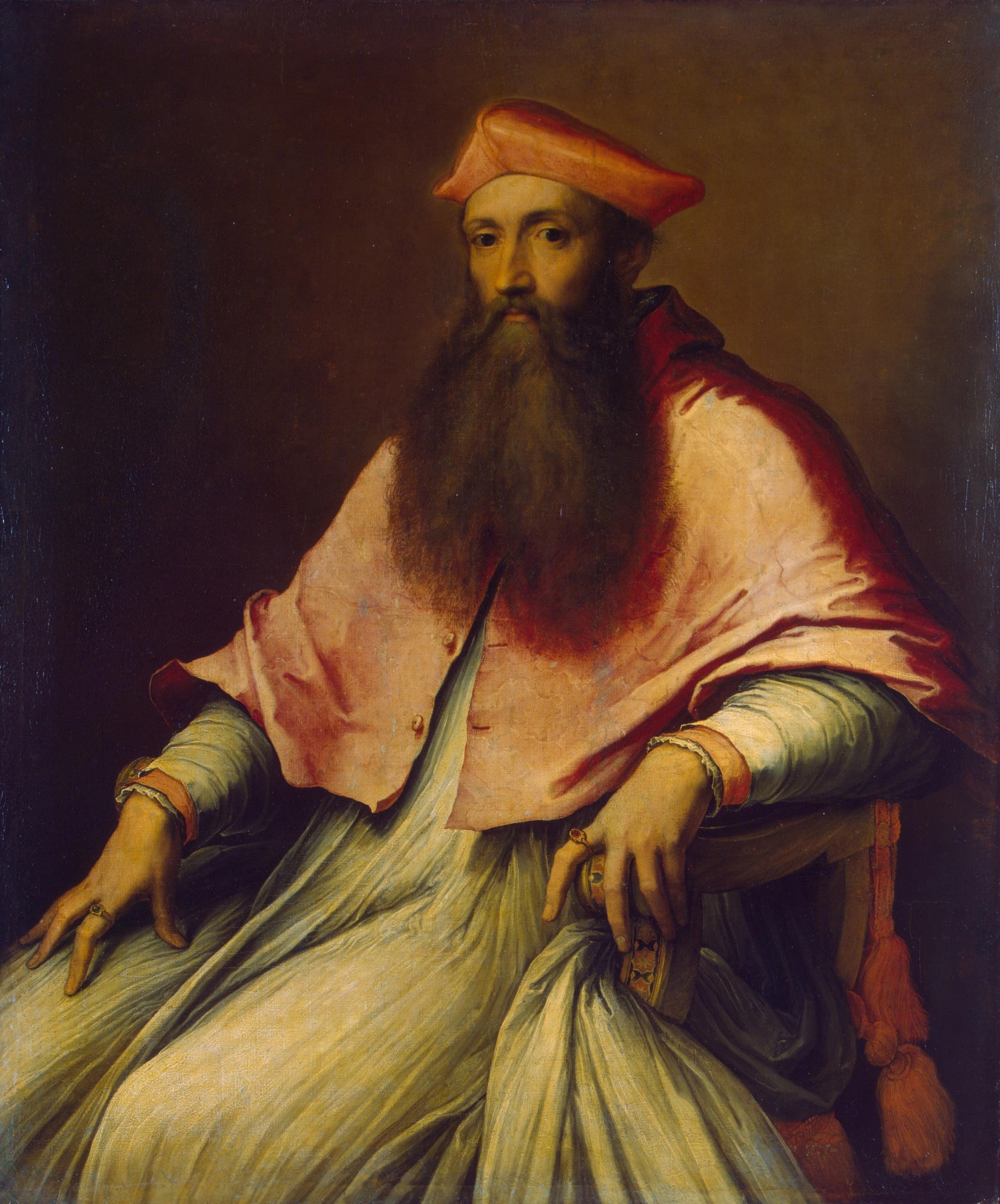 Kardinal Reginald Pole